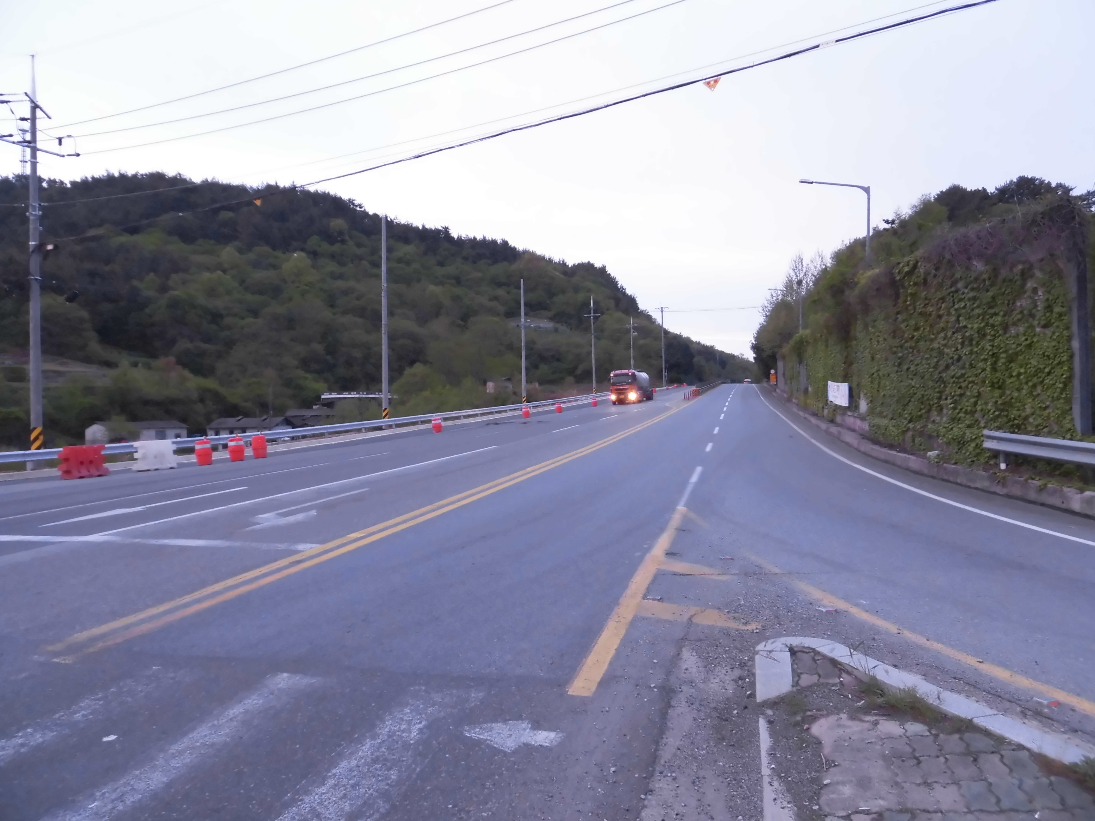 국도59호선 하동IC교차로부근